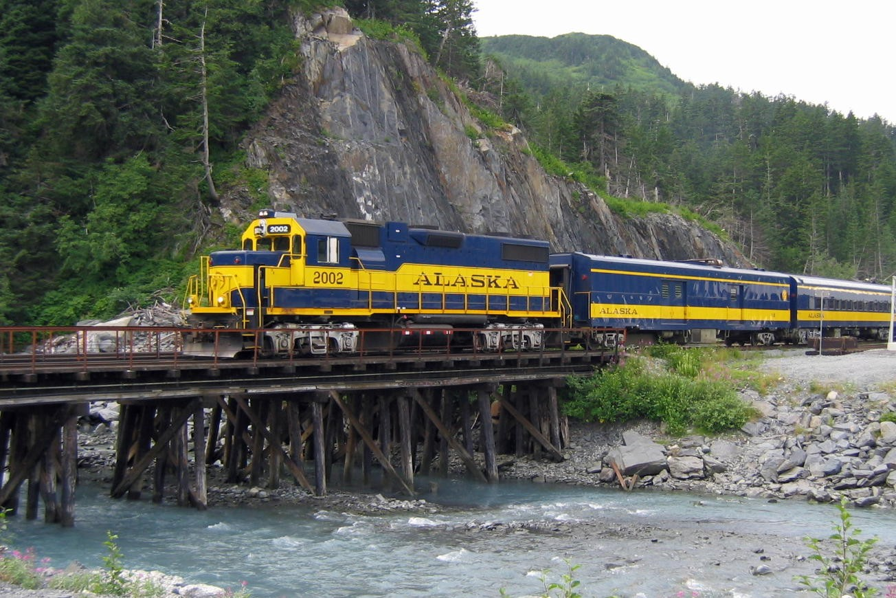 Alaska RR